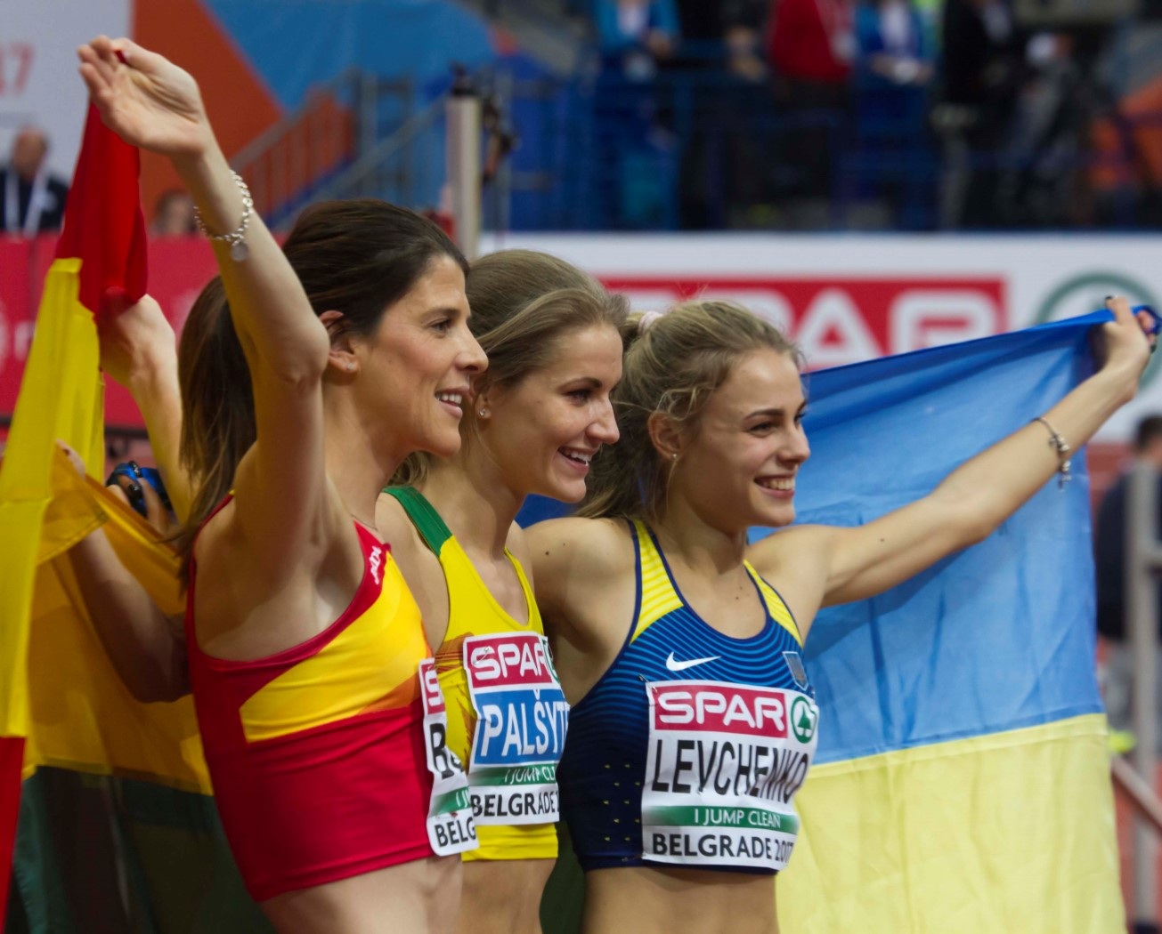 110 hoogspringpodium dames